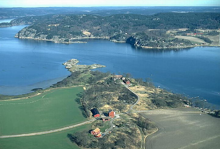 Dynge ruin och Gullmarsbergs säteri. Medeltida befäst gård och säteribildning från 1600-talet, monumentalt och strategiskt lokaliserade på en udde i inre av Gullmarsfjorden. Den tidiga anläggningen Dynge hus uppfördes som en kronans borg vid 1200-talets mitt och övergavs på 1500-talet. Säteriet Gullmarsberg uppfördes på 1600-talet av Rutger von Aschenberg och blev på 1940-talet återställt i sitt ursprungliga karolinska utseende. (Uddevalla kn, Gullmarsberg 2:2, GULLMARSBERGS SÄTERI) Motiv: Gullmarsberg Nyckelord: Byggnadsminnen, Flygbilder, Riksintressen Kategori: Herrgårds-/slottslandskap Dynge ruin och Gullmarsbergs säteri. Medeltida befäst gård och säteribildning från 1600-talet, monumentalt och strategiskt lokaliserade på en udde i inre av Gullmarsfjorden. Den tidiga anläggningen Dynge hus uppfördes som en kronans borg vid 1200-talets mitt och övergavs på 1500-talet. Säteriet Gullmarsberg uppfördes på 1600-talet av Rutger von Aschenberg och blev på 1940-talet återställt i sitt ursprungliga karolinska utseende. (Uddevalla kn, Gullmarsberg 2:2, GULLMARSBERGS SÄTERI).